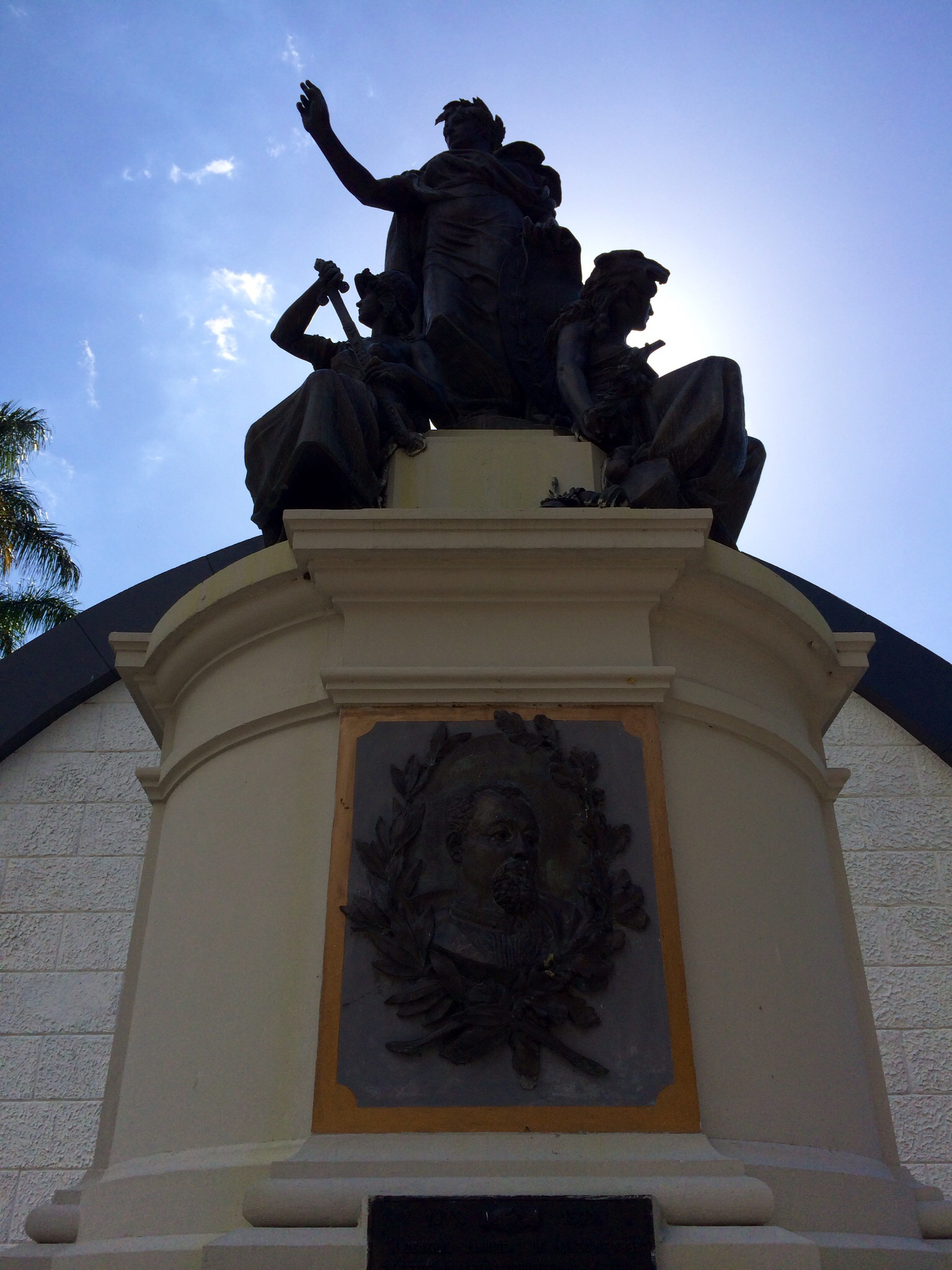 Tumbabarrios1